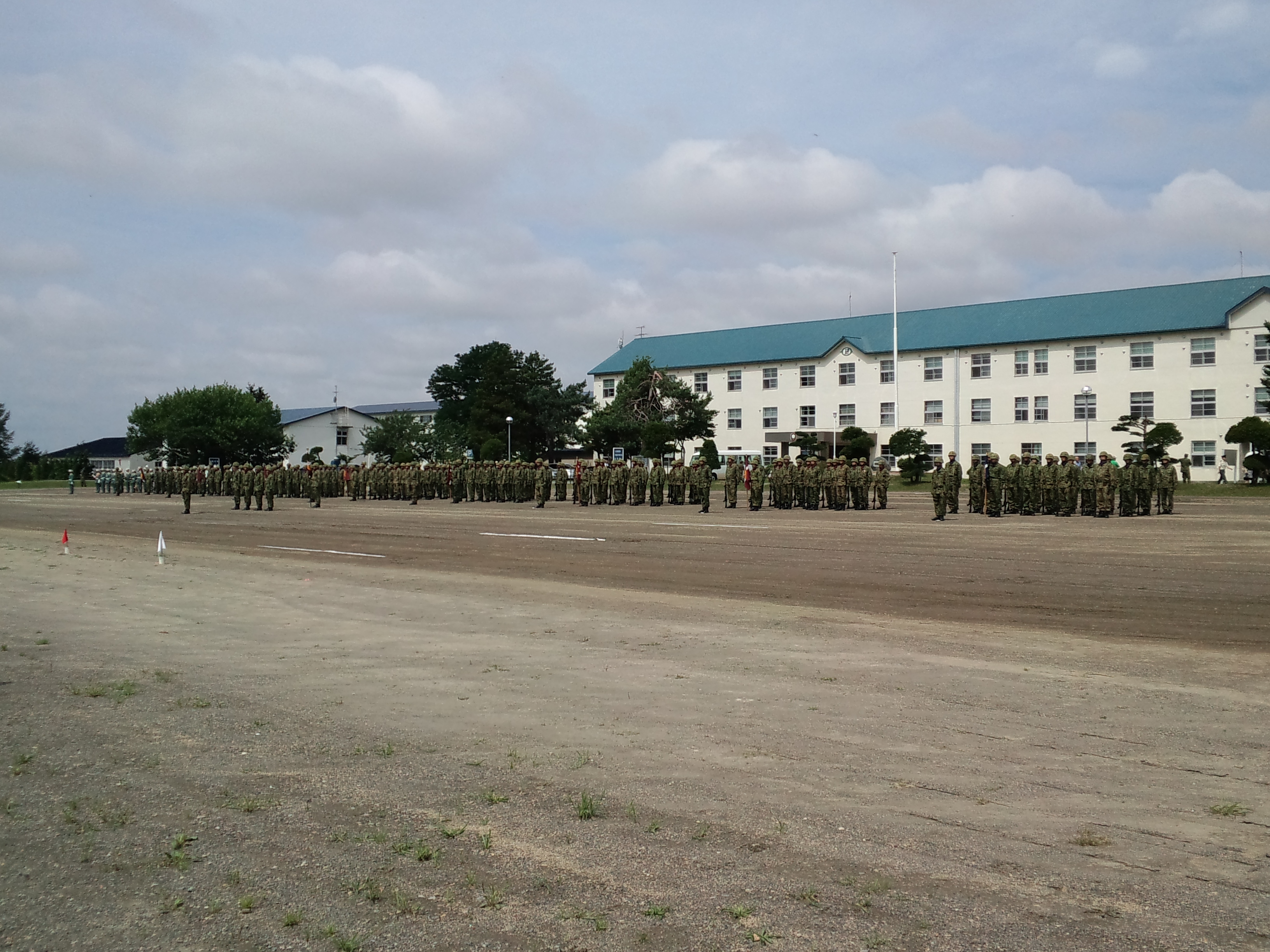 陸上自衛隊・岩見沢駐屯地の観閲式